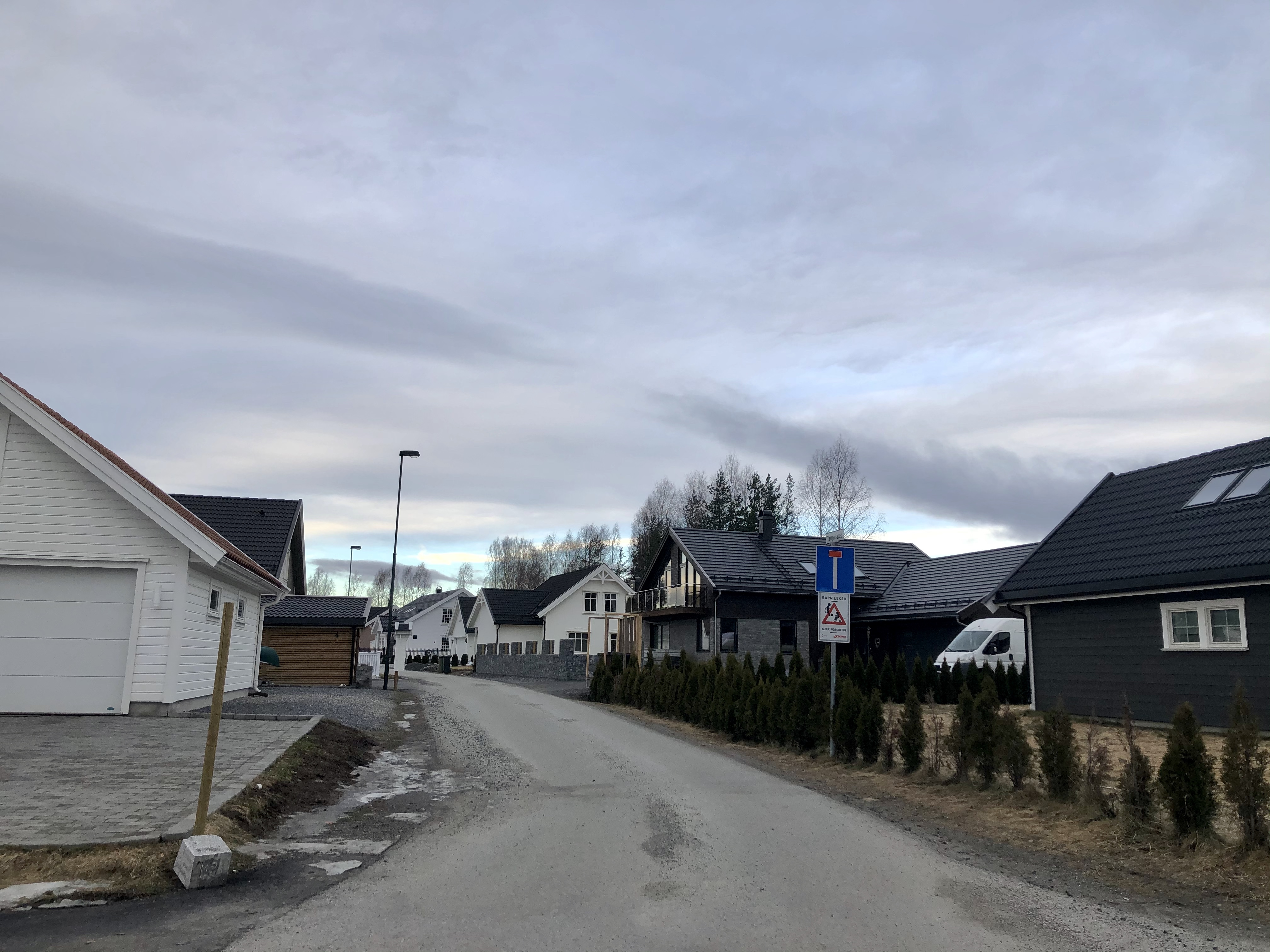 Tørrjulfaret, Hønefoss